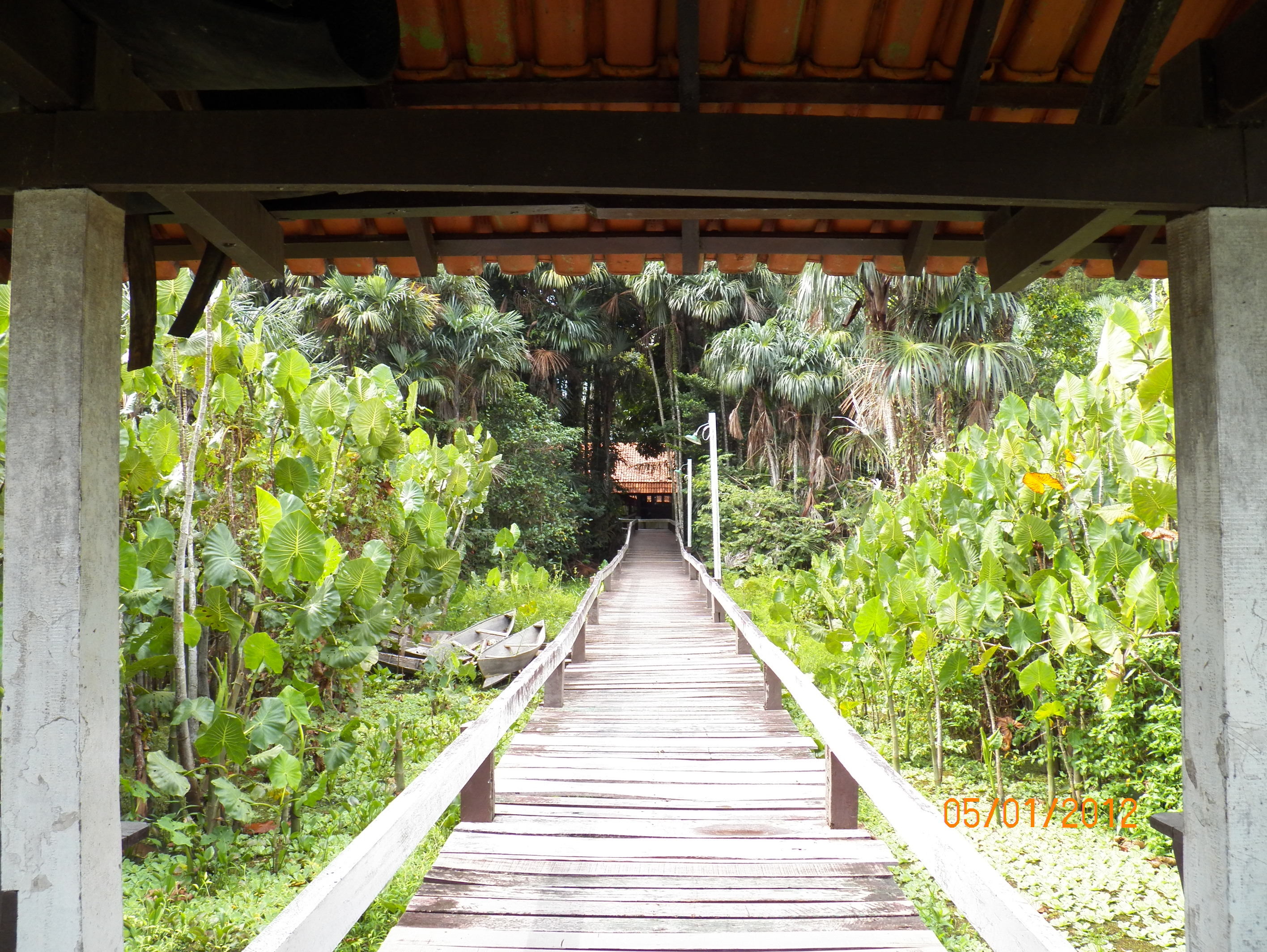 Soleira e ponte no mangal. Parque Estadual de Belém